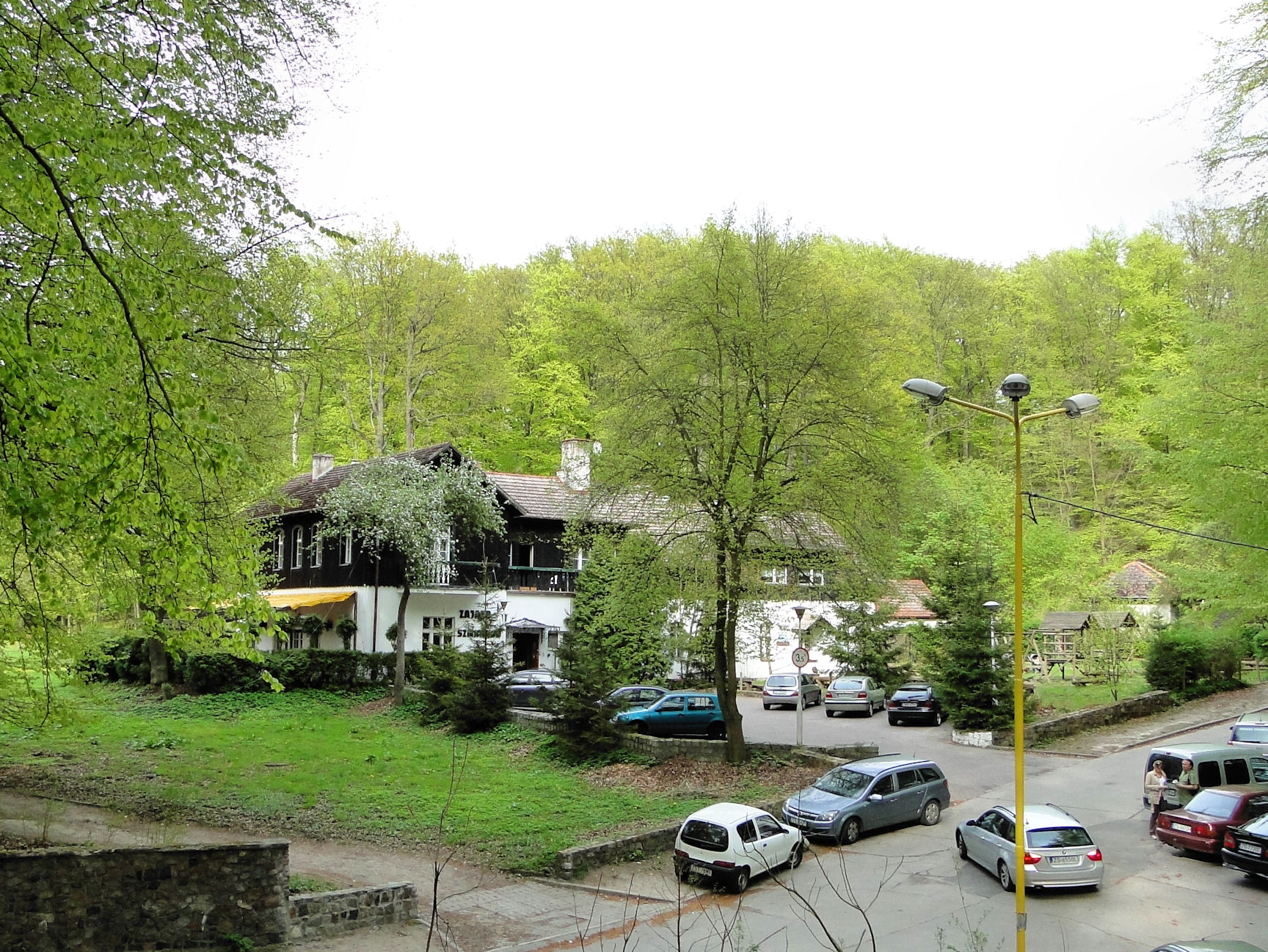 Zajazd Szmaragd przy Jeziorze Szmaragdowym